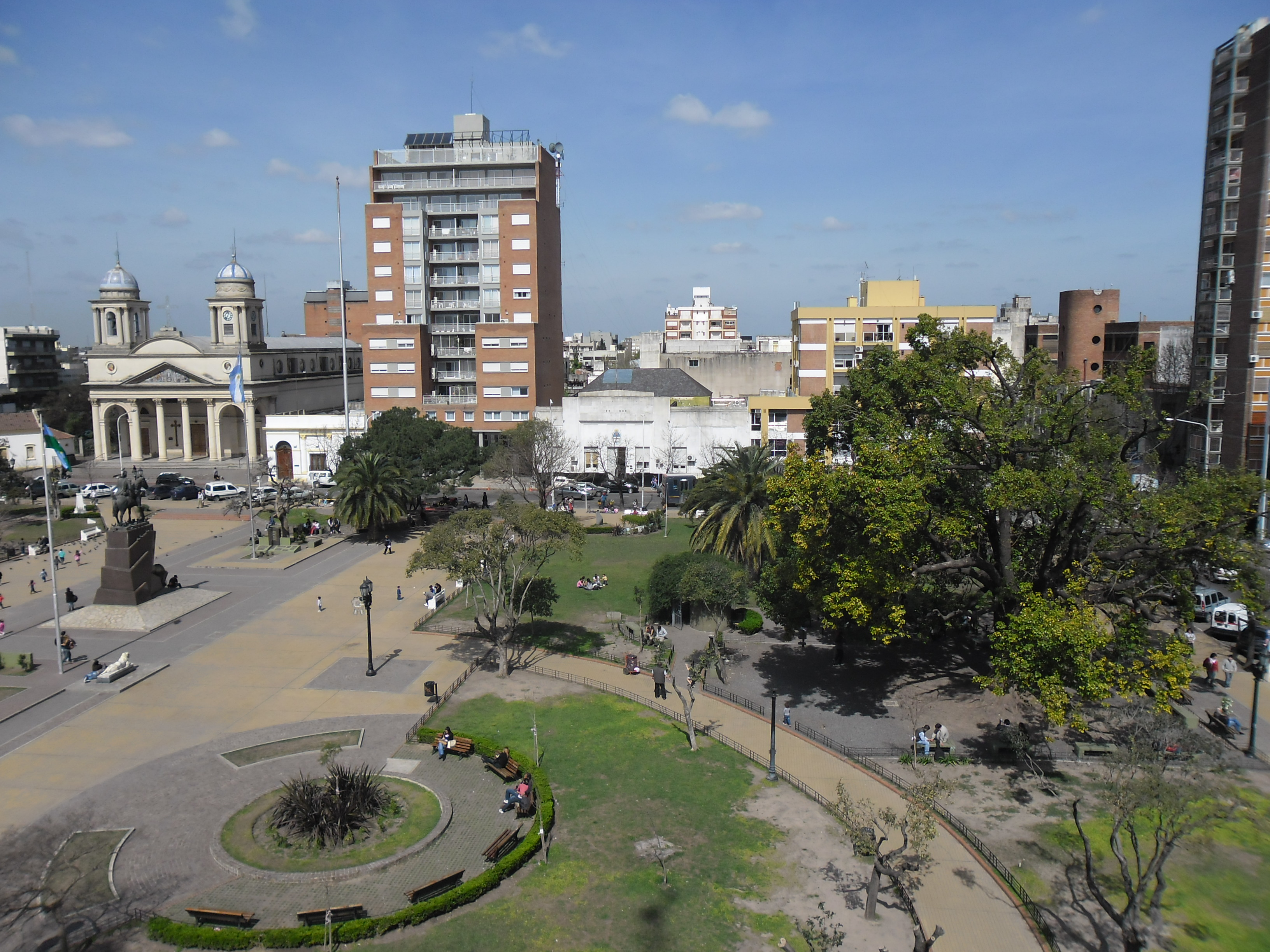 En torno de la Plaza Libertador San Martín se encuentran la centenaria Catedral de Nuestra Señora del Buen Viaje, una moderna torre y la primera sede municipal de Morón.